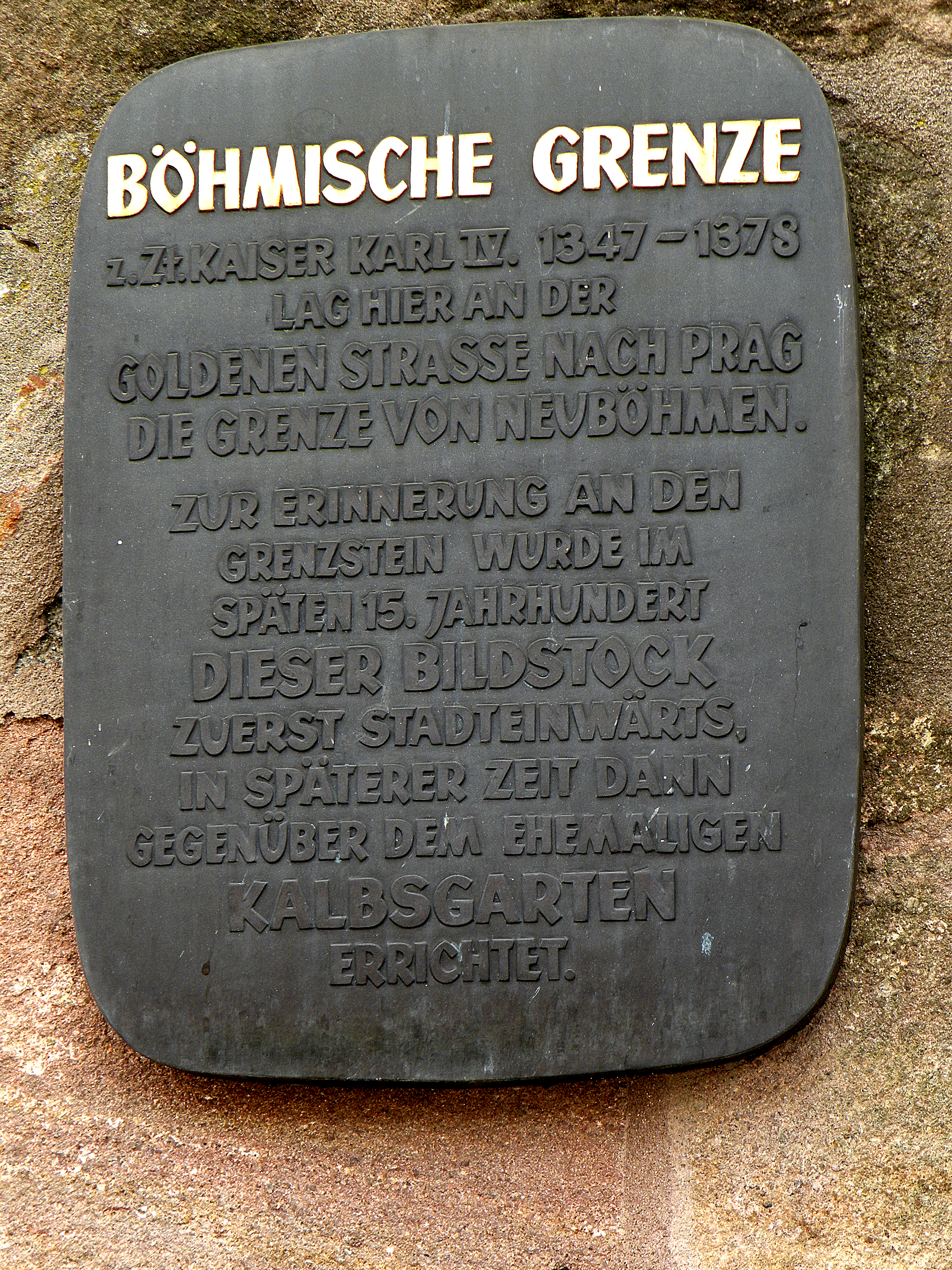 Памятная доска на здании заставы на бывшей границе с Богемией. Нюрнберг